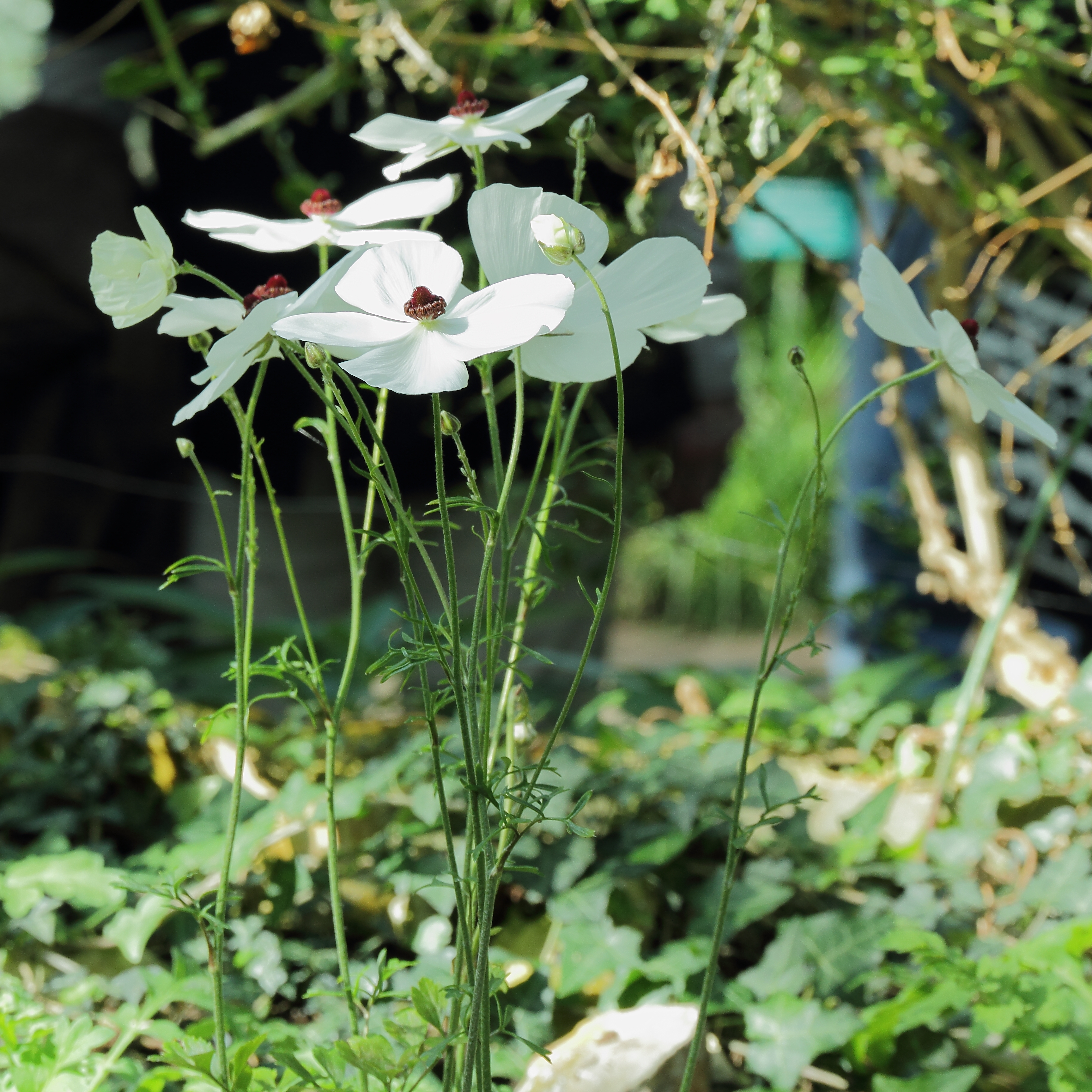 Ranunculus asiaticus i Bergianska trädgården.